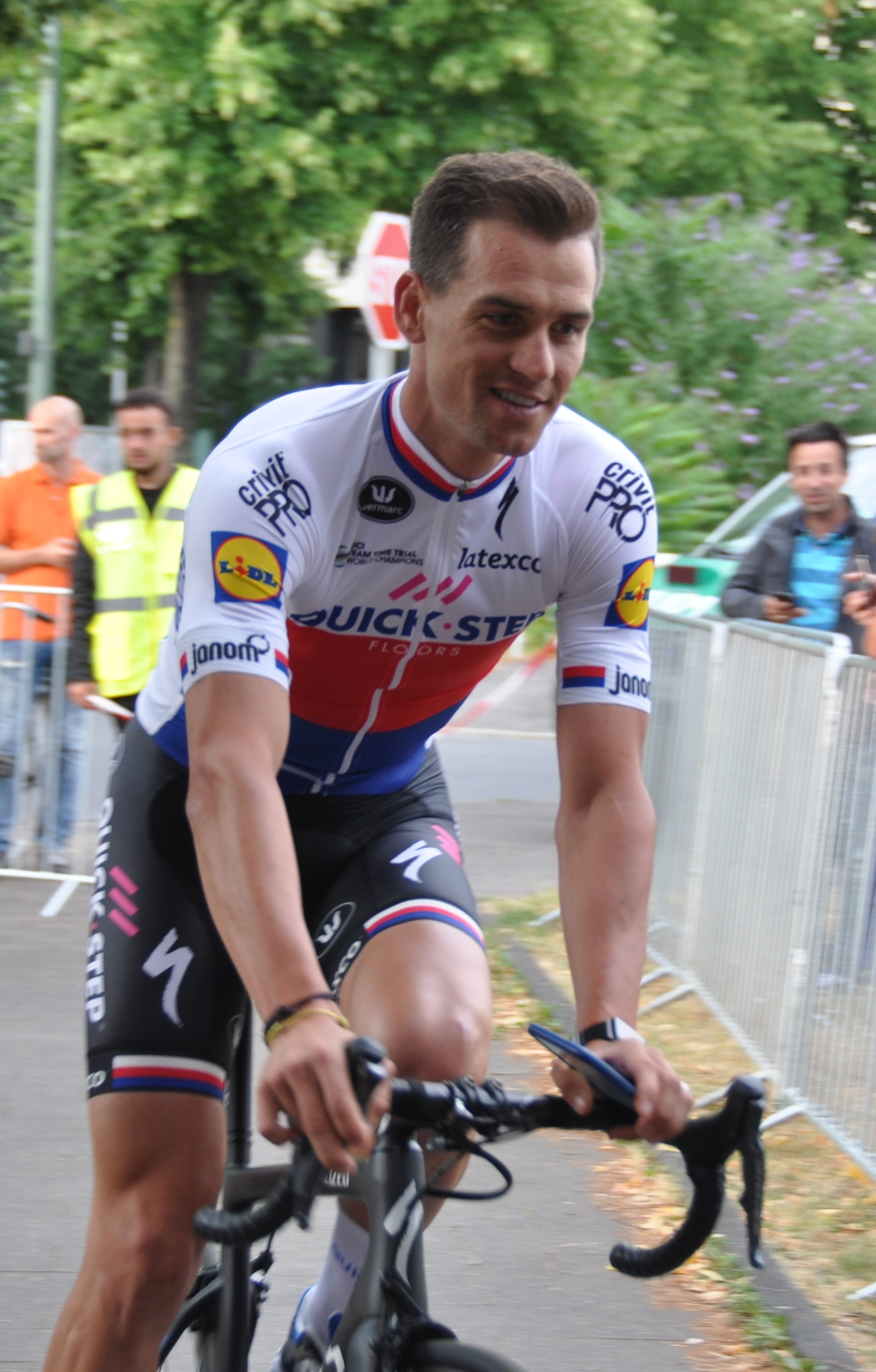 Arnaud Demare, französischer Radrennfahrer